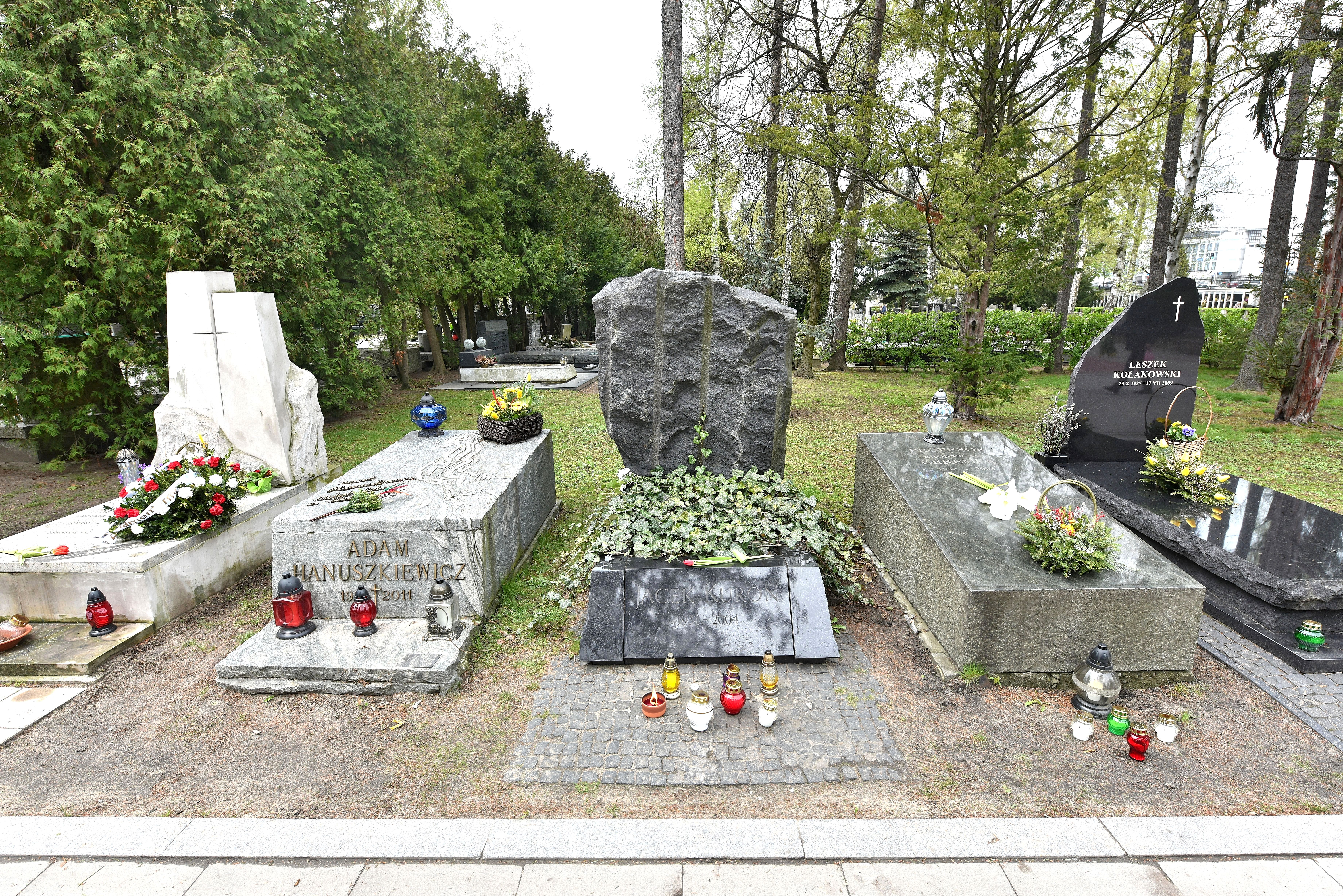 Cmentarz Wojskowy na Powązkach w Warszawie. Groby (od lewej): Zbigniewa Romaszewskiego, Adama Hanuszkiewicza, Jacka Kuronia, Bronisława Geremka i Leszka Kołakowskiego